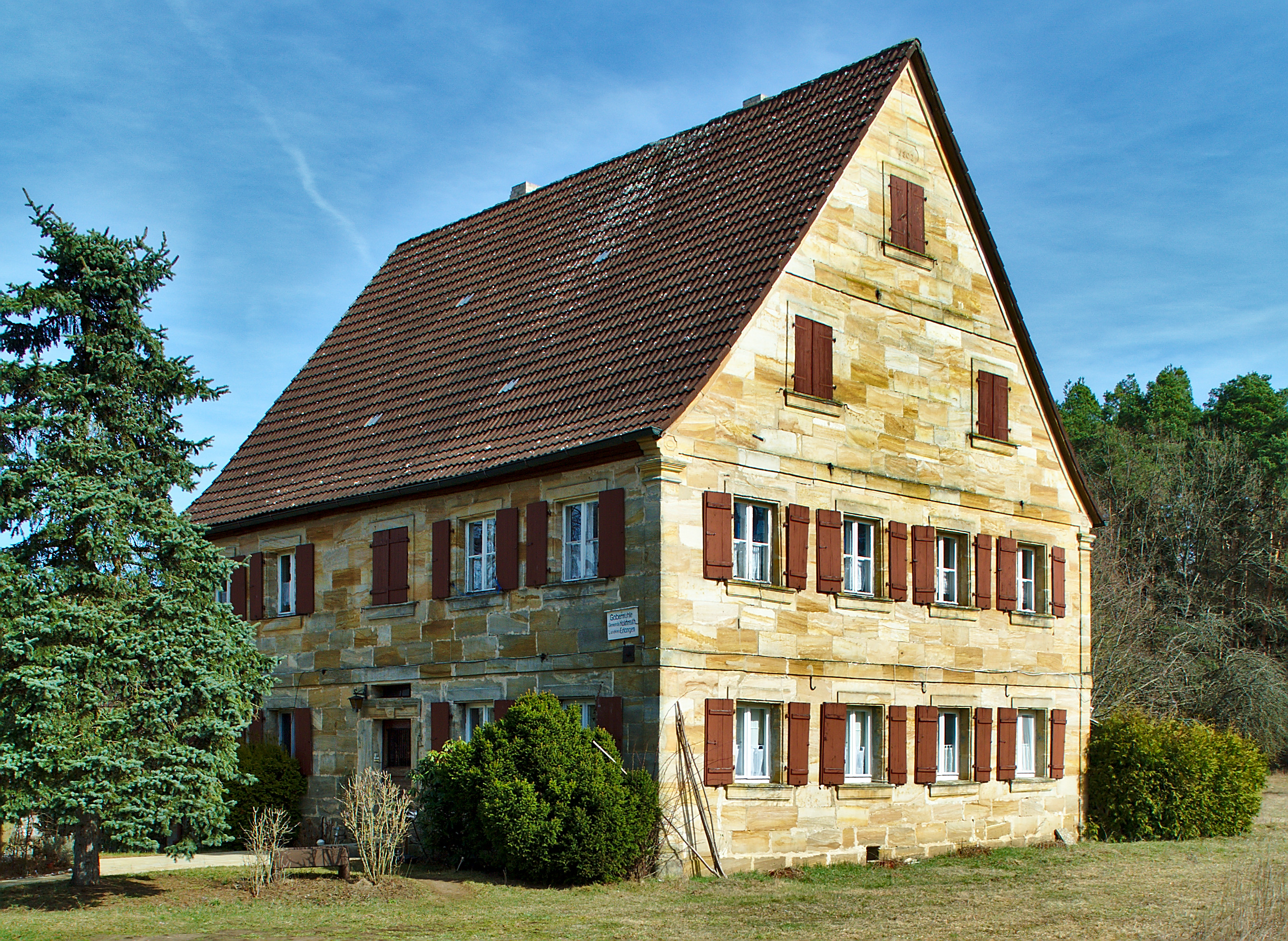 Gabermühle bei Kalrchreuth, Wohngebäude This is a photograph of an architectural monument.